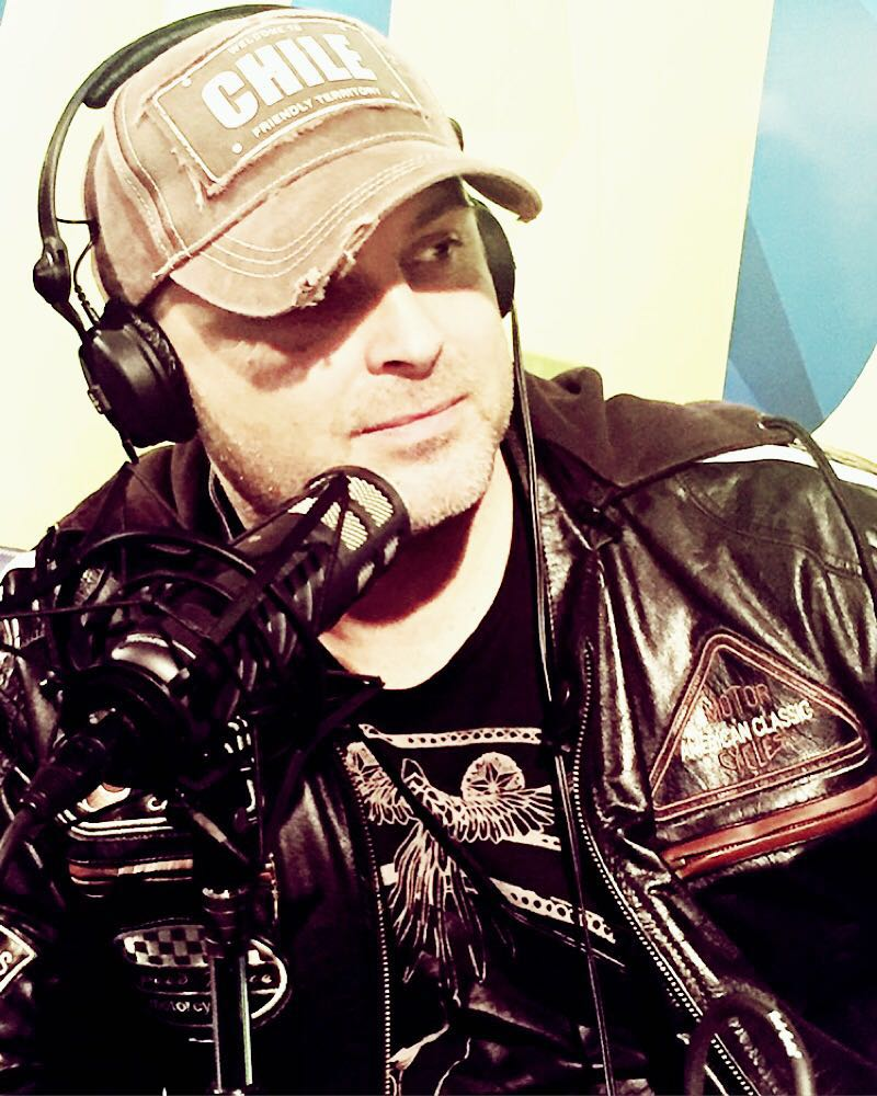 Umberto Alongi ospite a Radio Fiume Ticino